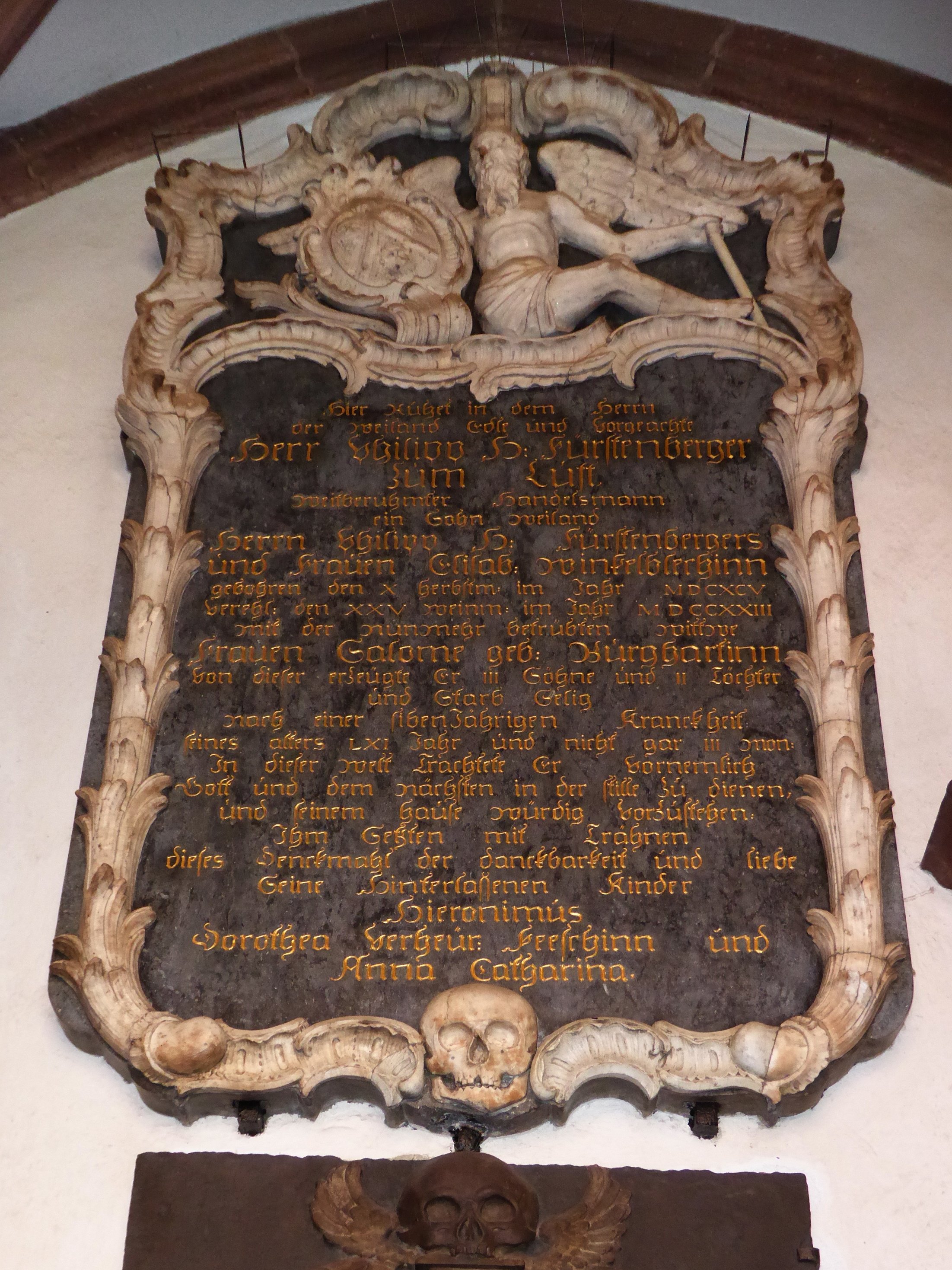 Epitaph für Philipp Fürstenberger (1695–1723) von Johann Friedrich (der Ältere) Funk (1706–1775) Im Kreuzgang des Basler Münster. Die aufgesetzte Marmorrahmung «à palmes» am Epitaph für Philipp Fürstenberger ist von auffallender Ähnlichkeit zu geschnitzten Spiegelrahmen seiner Werkstatt. 1742 wird Johann Friedrich «Spiegelhändler und Sculpteur» genannt.